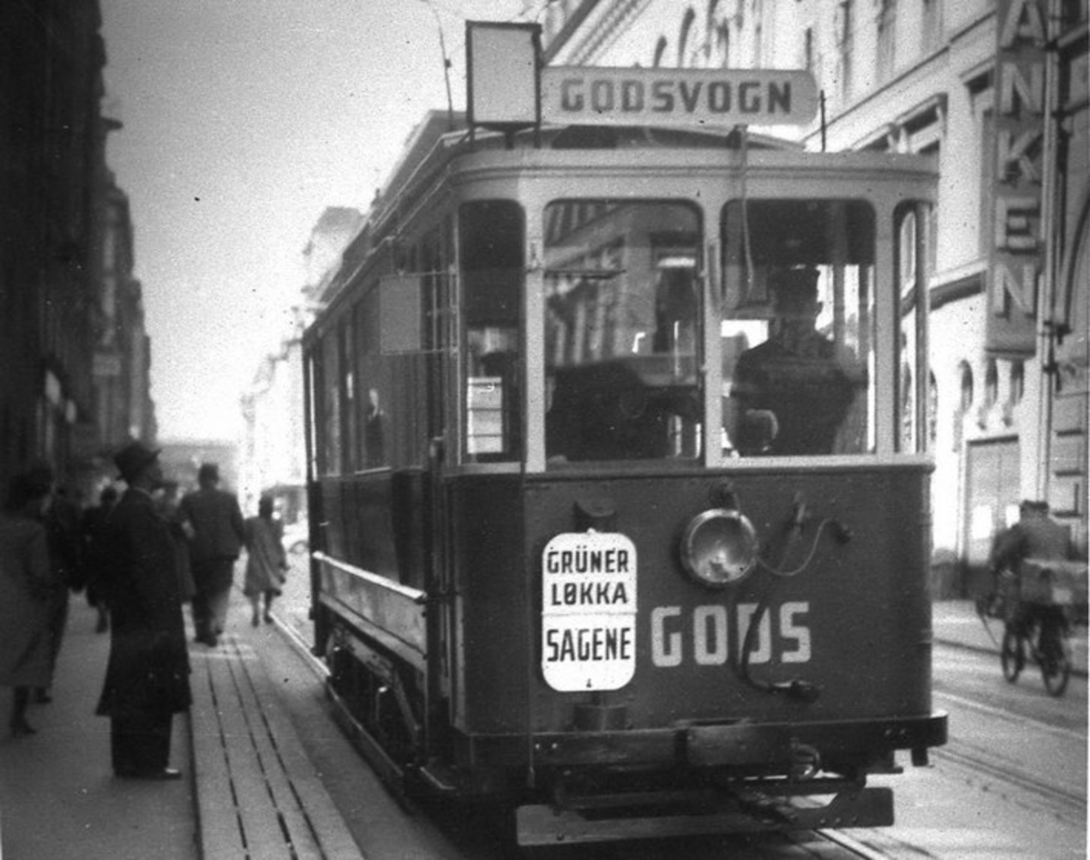 Trikk i godsrute 1940-1945. Oslo Sporveier. Trikk til Sagene over Grünerløkka. Motorvogn 56 type SS fra 1899, ombygd (1919). Godsrute. 1940-45 ble vogna brukt som godsvogn for stykkgodstransport på bylinjene. Fra Prinsens gate. Bilde tatt under krigen.